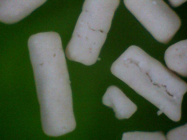 שמרים במיקרוסקופ ביתי